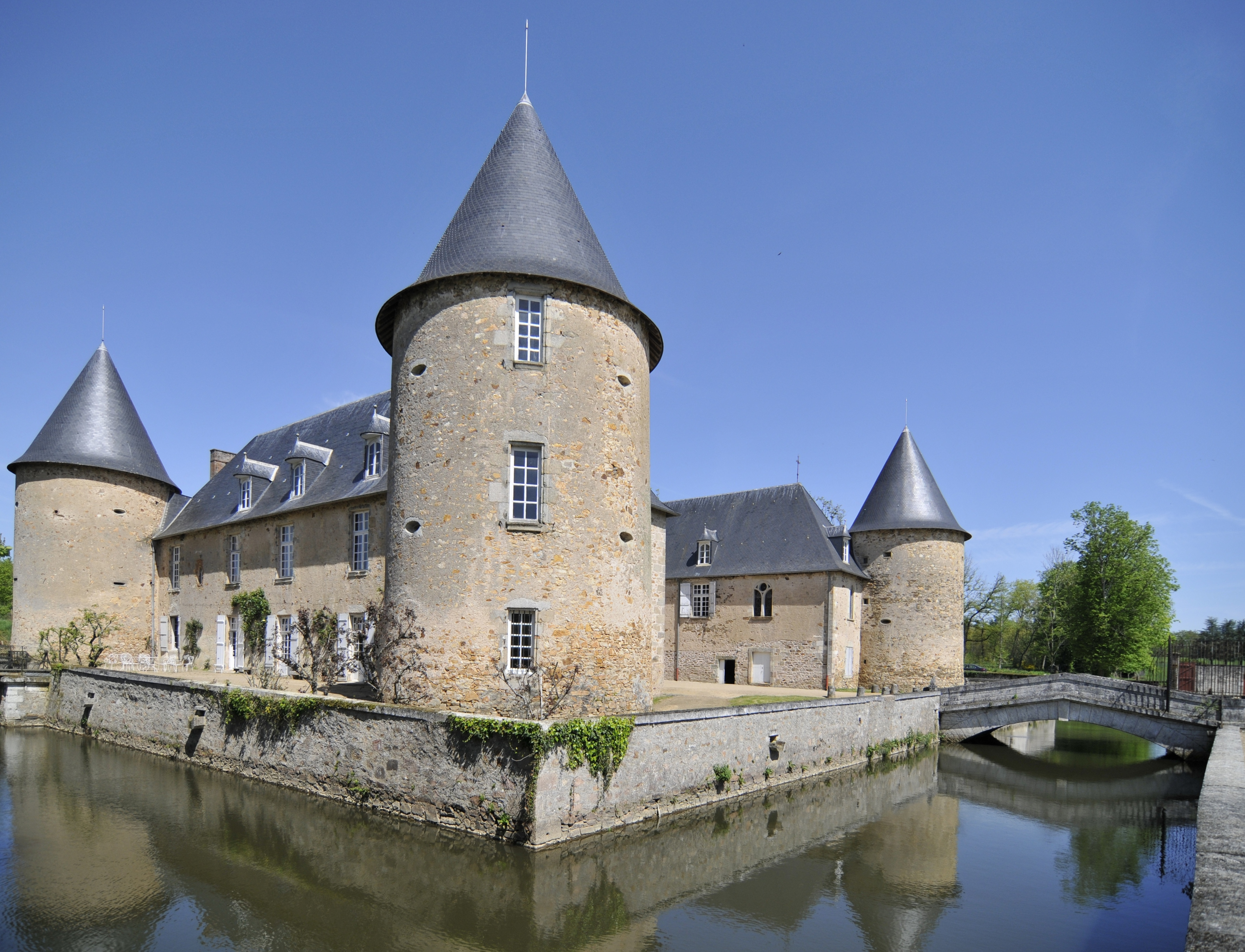 Château de Rochebrune (16), France